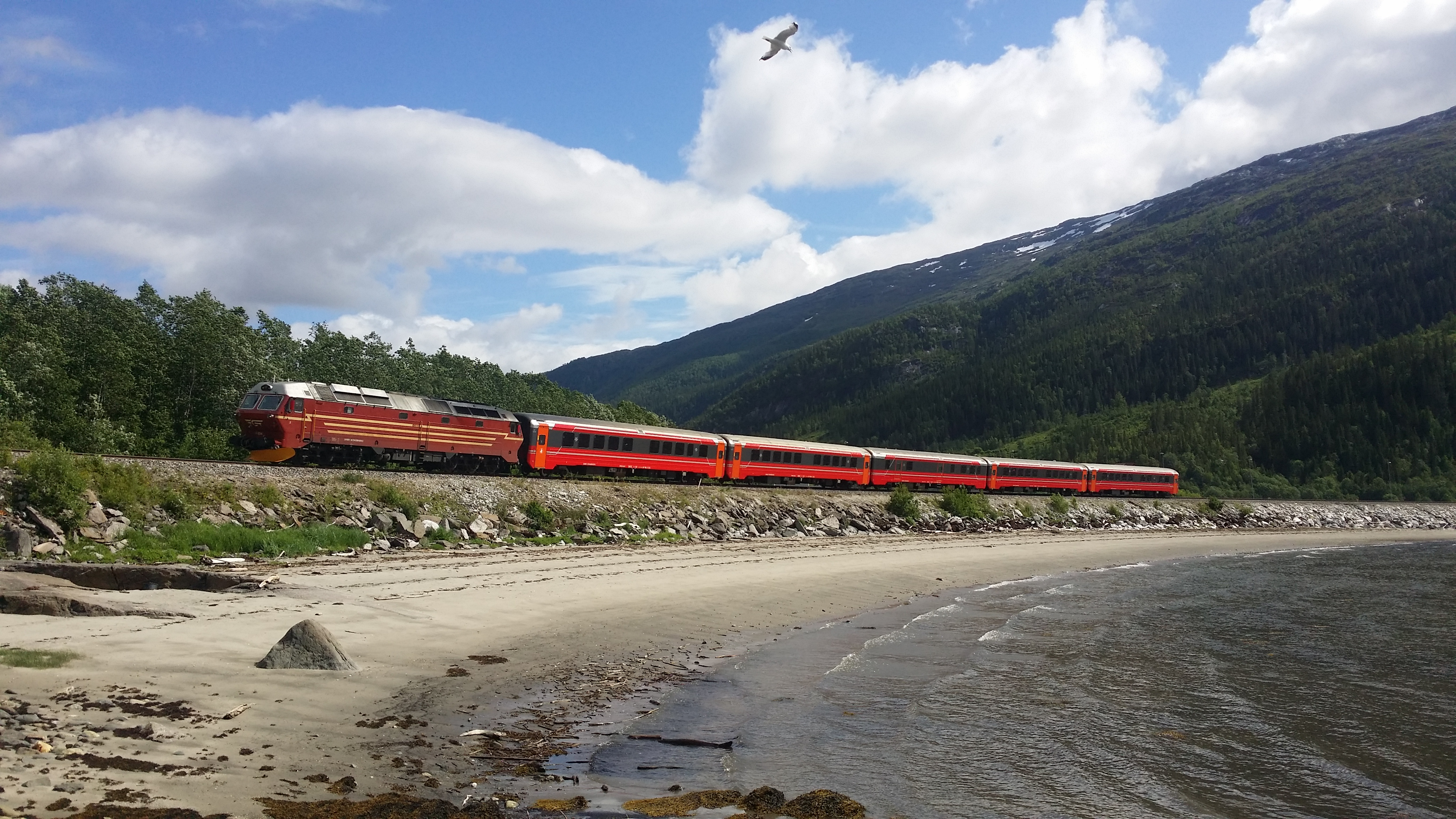 Dagtoget Trondheim-Bodø sør for Mo i Rana.